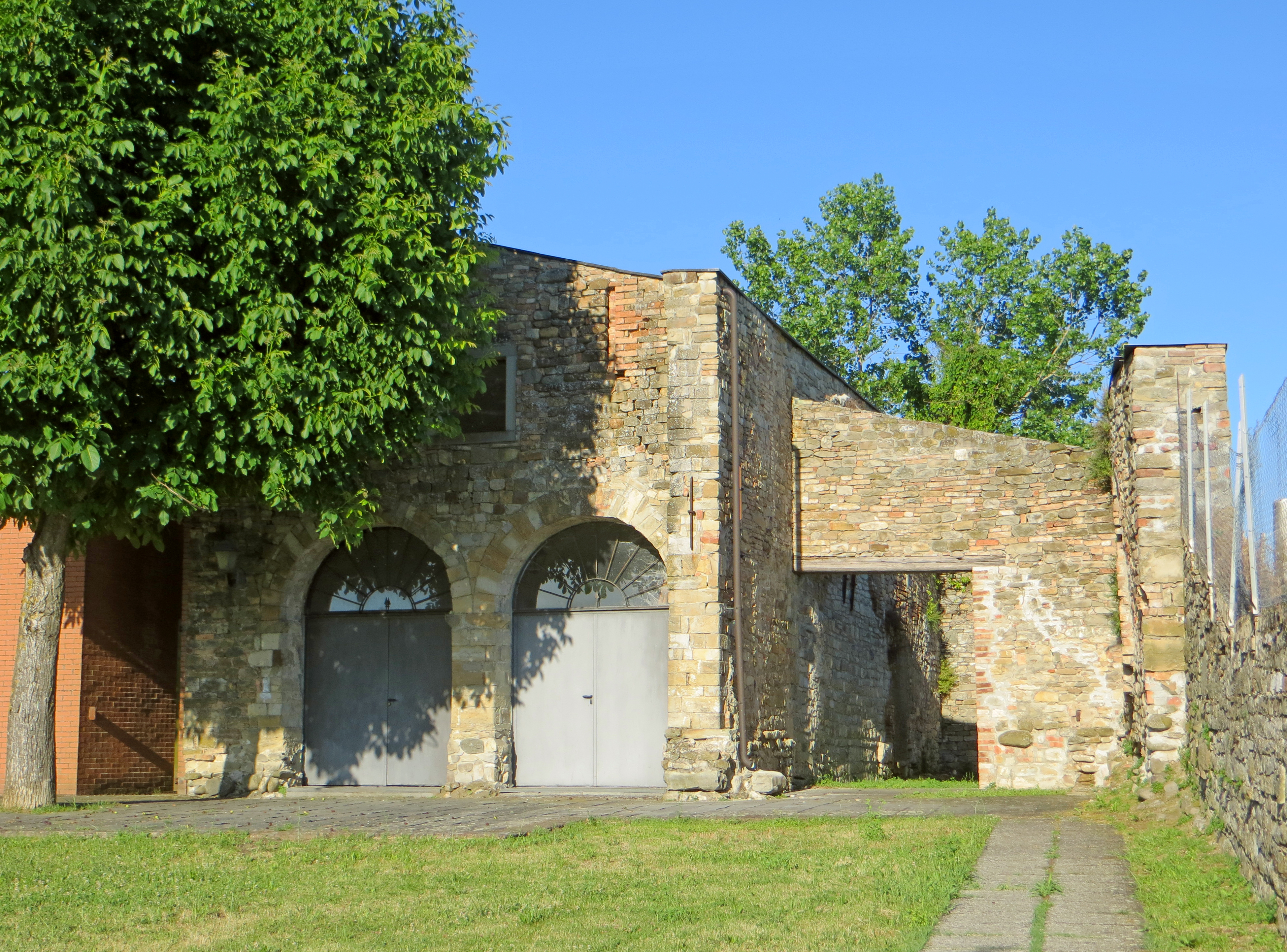 Pieve di San Martino (Arola, Langhirano) - facciata